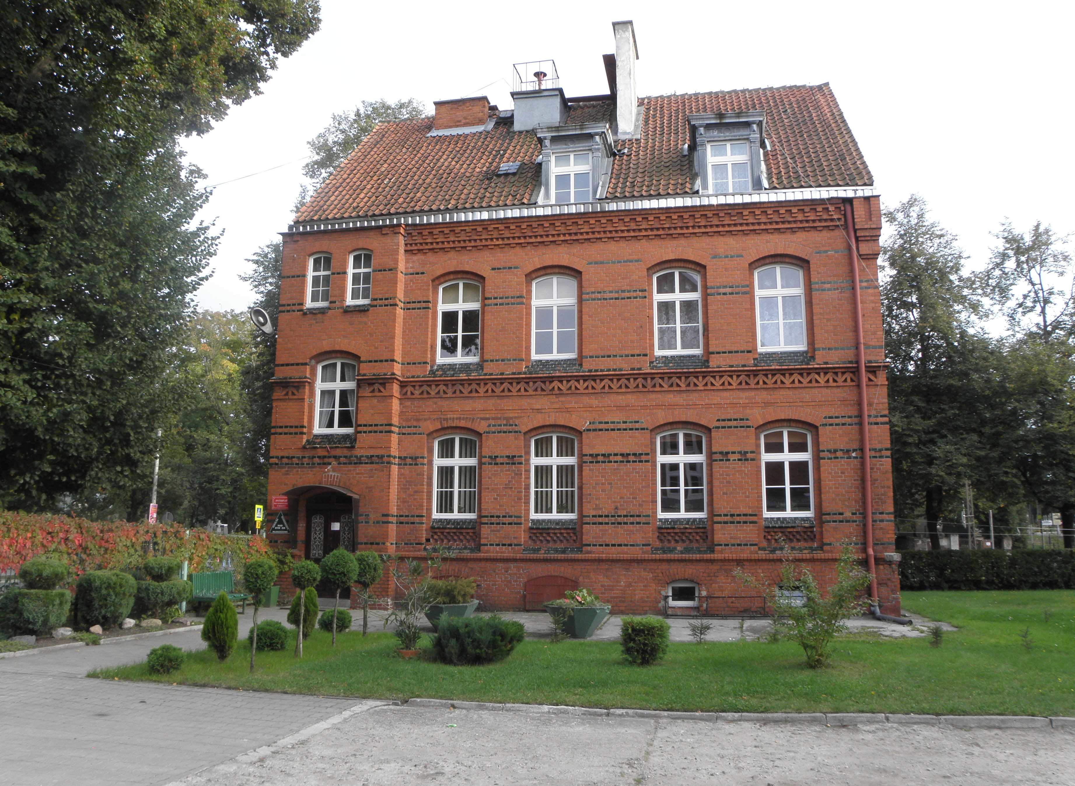 Internat. Gmina Biskupiec, powiat olsztyński.